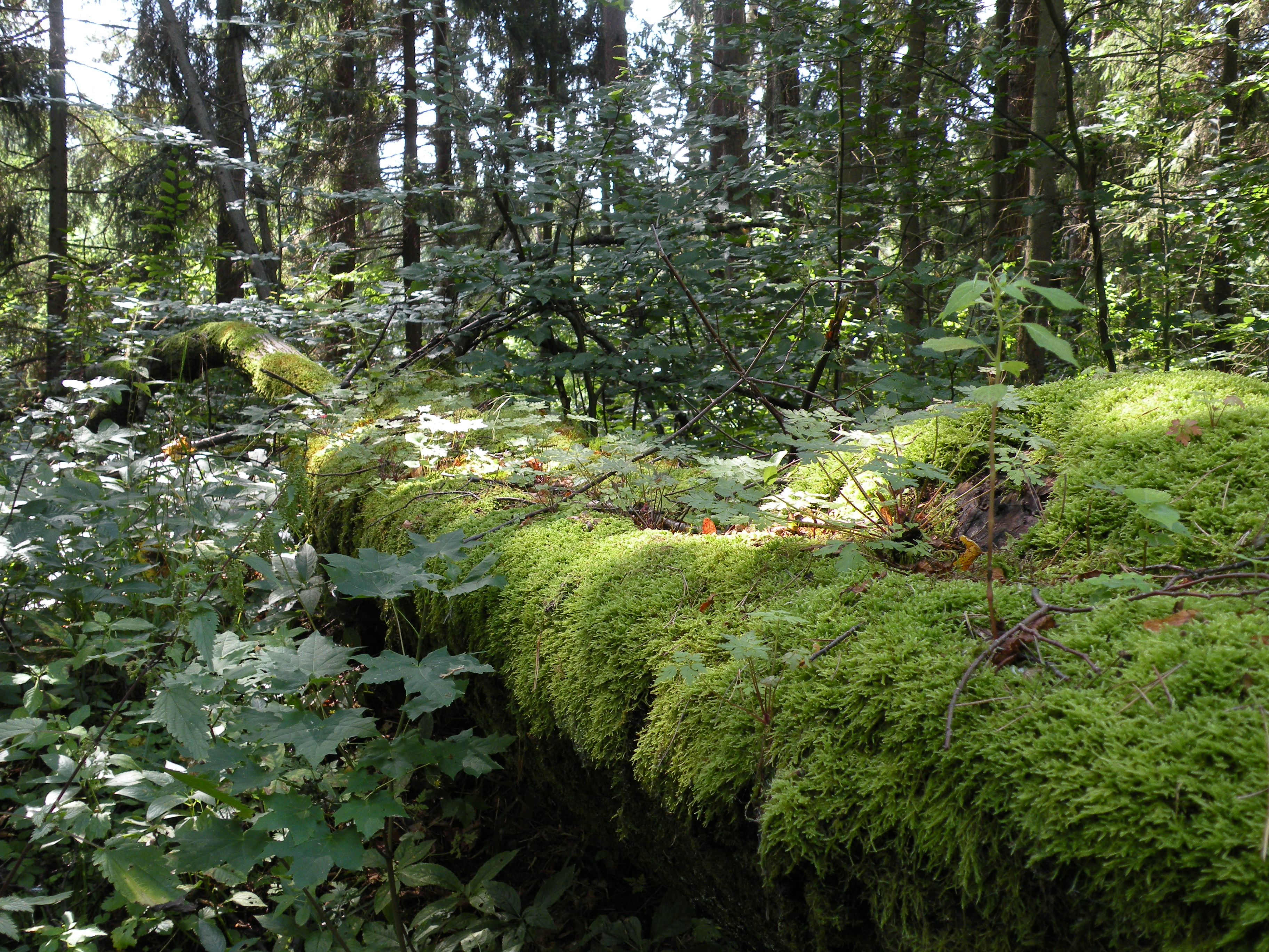 Martwe drzewo w rezerwacie Las Warmiński, koło Jez. Jełguń